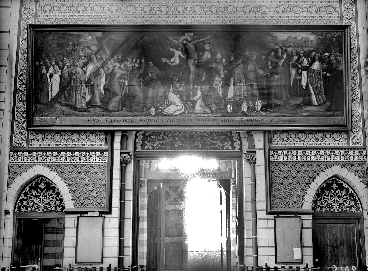 Voormalige Derde Franciscanenkerk (1859-1971): interieur met schilderij van Jan Snellinck I uit 1609: De droom van paus Honorius IV. Afmetingen: ca. 6,5 x 2 m. Huidige verblijfplaats onbekend. Address Tongersestraat/Patersbaan Maastricht Netherlands DateAugust 1917Source/PhotographerRijksdienst voor het Cultureel Erfgoed Licensing[edit] This file was provided to Wikimedia Commons by the Rijksdienst voor het Cultureel Erfgoed as part of an image release. The Rijksdienst voor Cultureel Erfgoed, exclusively provides images that are either made by its own employees up to a 1200px size, or that are otherwise free of copyright. Attribution: Rijksdienst voor het Cultureel Erfgoed